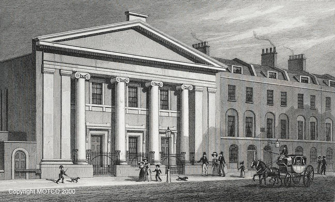 The Unitarian Chapel, Finsbury (South Place Chapel). Stahlstich von J. F. Havell nach Thomas Hosmer Shepherd, aus: "Metropolitan Improvements; or London in the Nineteenth Century", von James Elmes, bei Jones & Co.